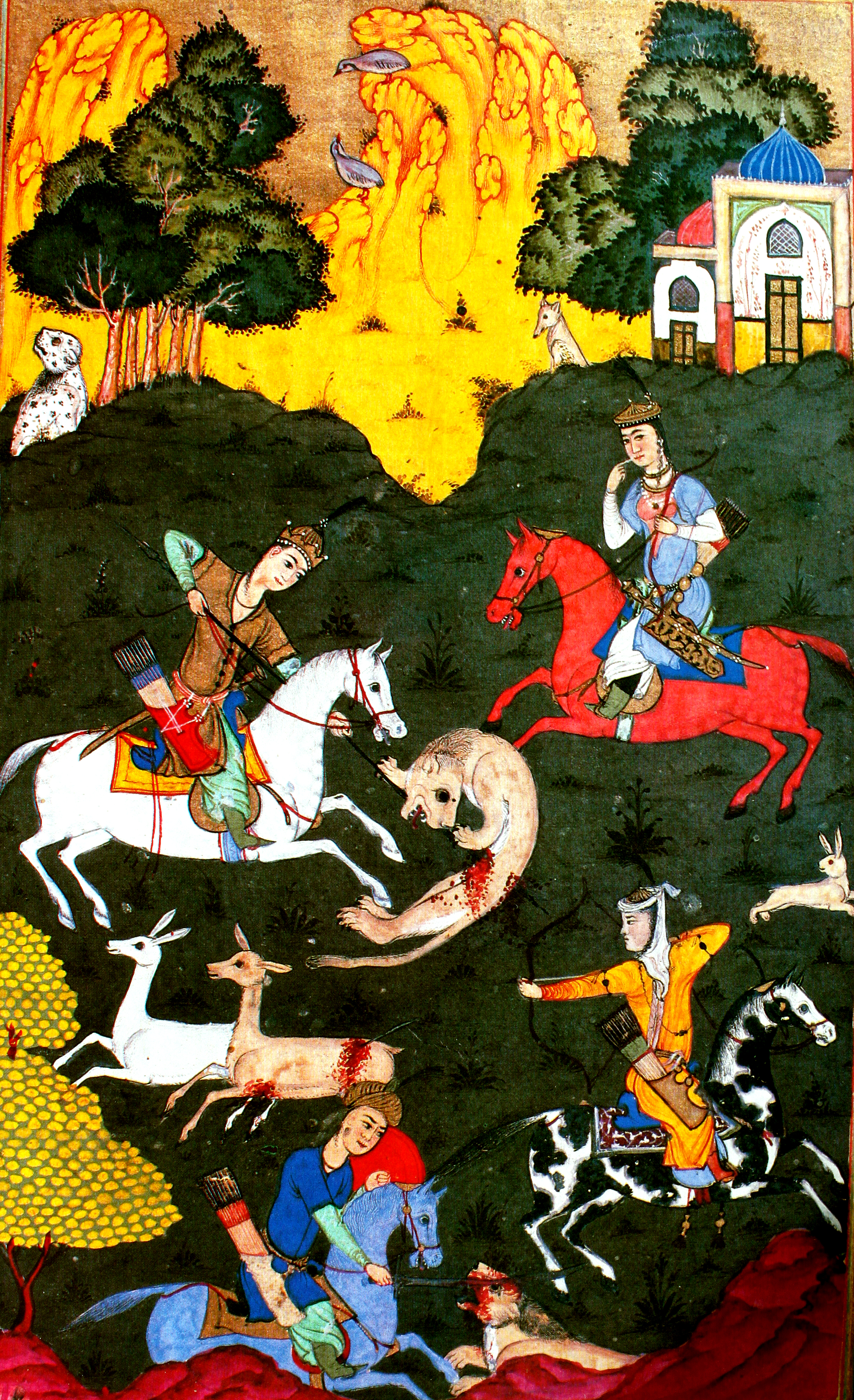 Xosrov və Şirinin ov vaxtı görüşü, Buxara, 1648